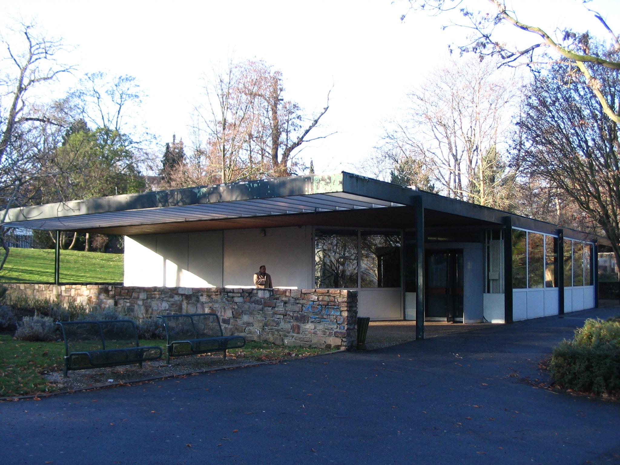 Papageienhaus im Mainzer Stadtpark